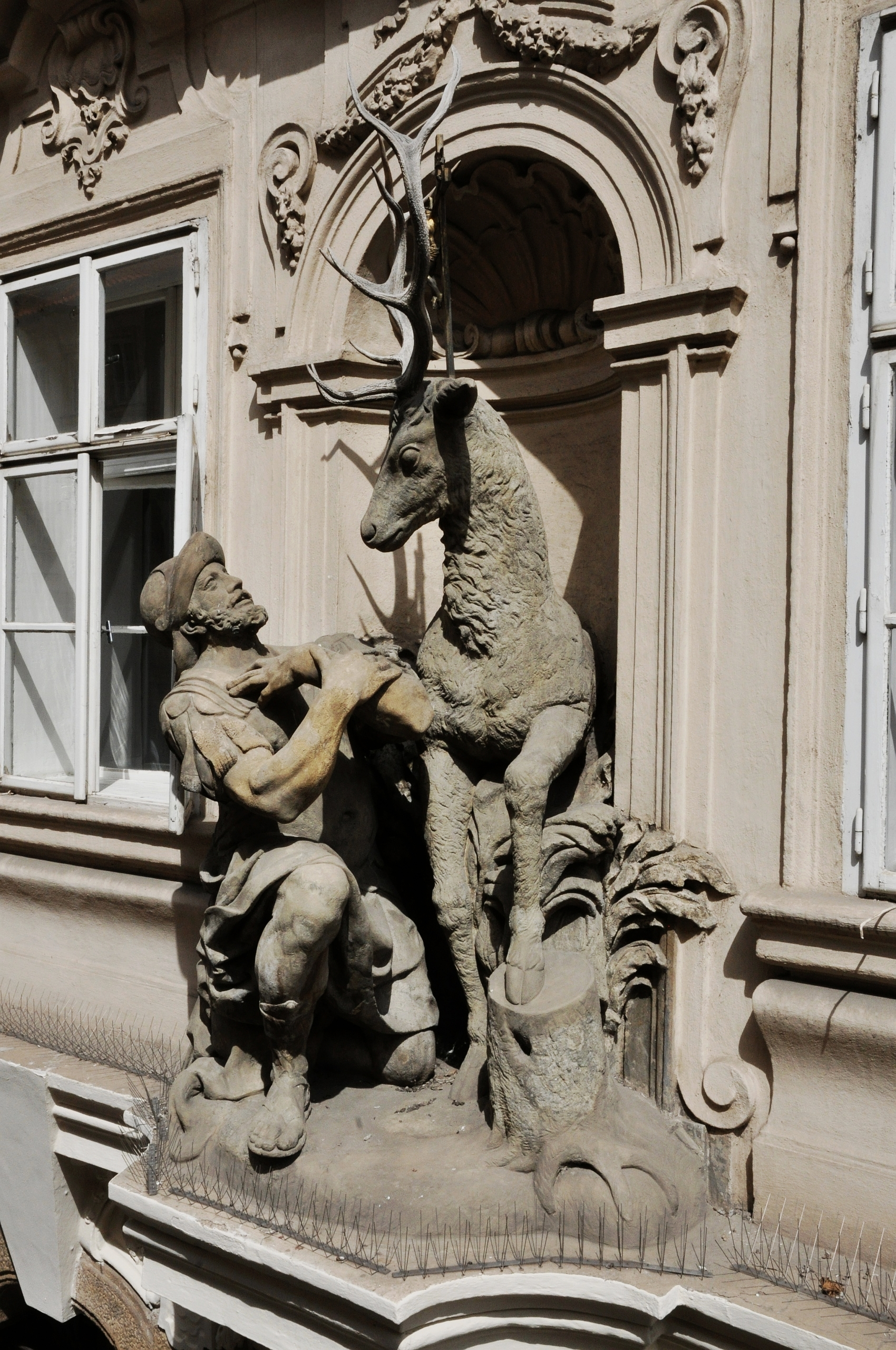 House sign, Malá Strana, Tomášská, Prague